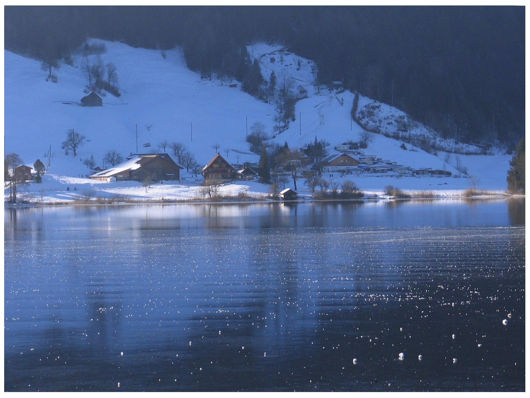 Ägerisee (Schweiz) mit dünner durchsichtiger Eisschicht